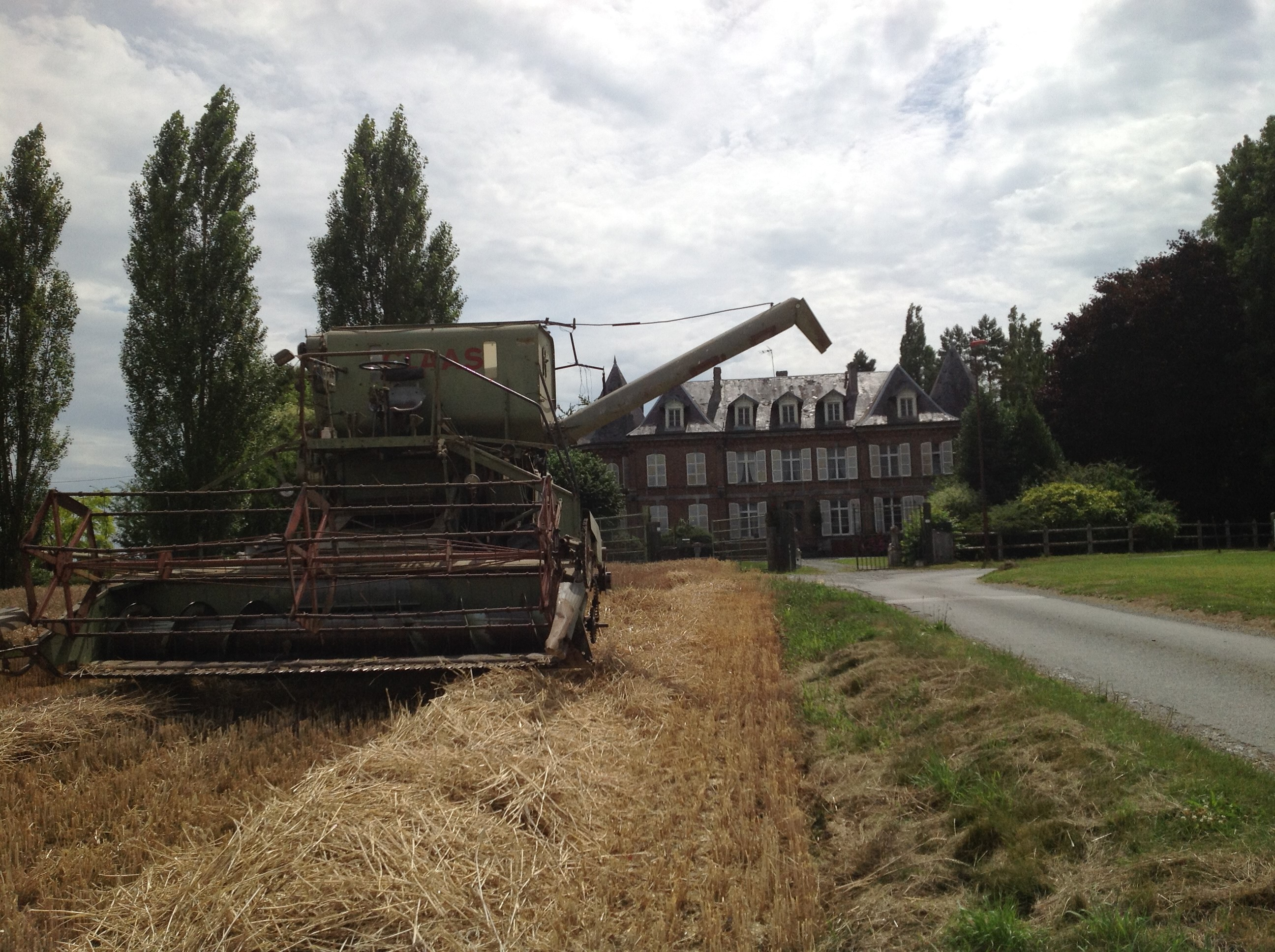 activité agricole dans le Hameau de l'Arrouaise, Oisy, Aisne